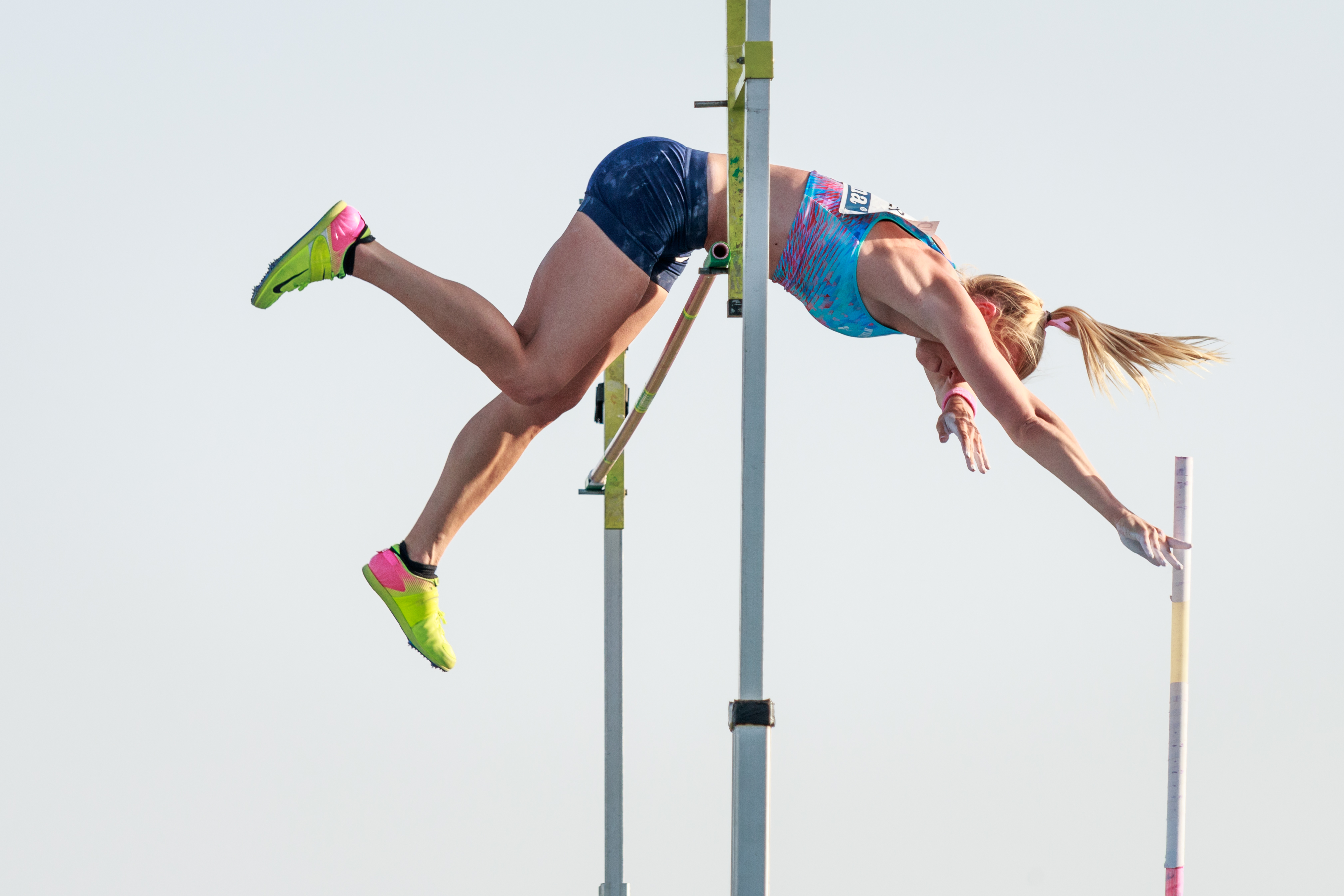 Mary Saxer (USA). Salto con garrocha. IAAF World Challenge. Meeting Madrid 2017. Moratalaz, Madrid.